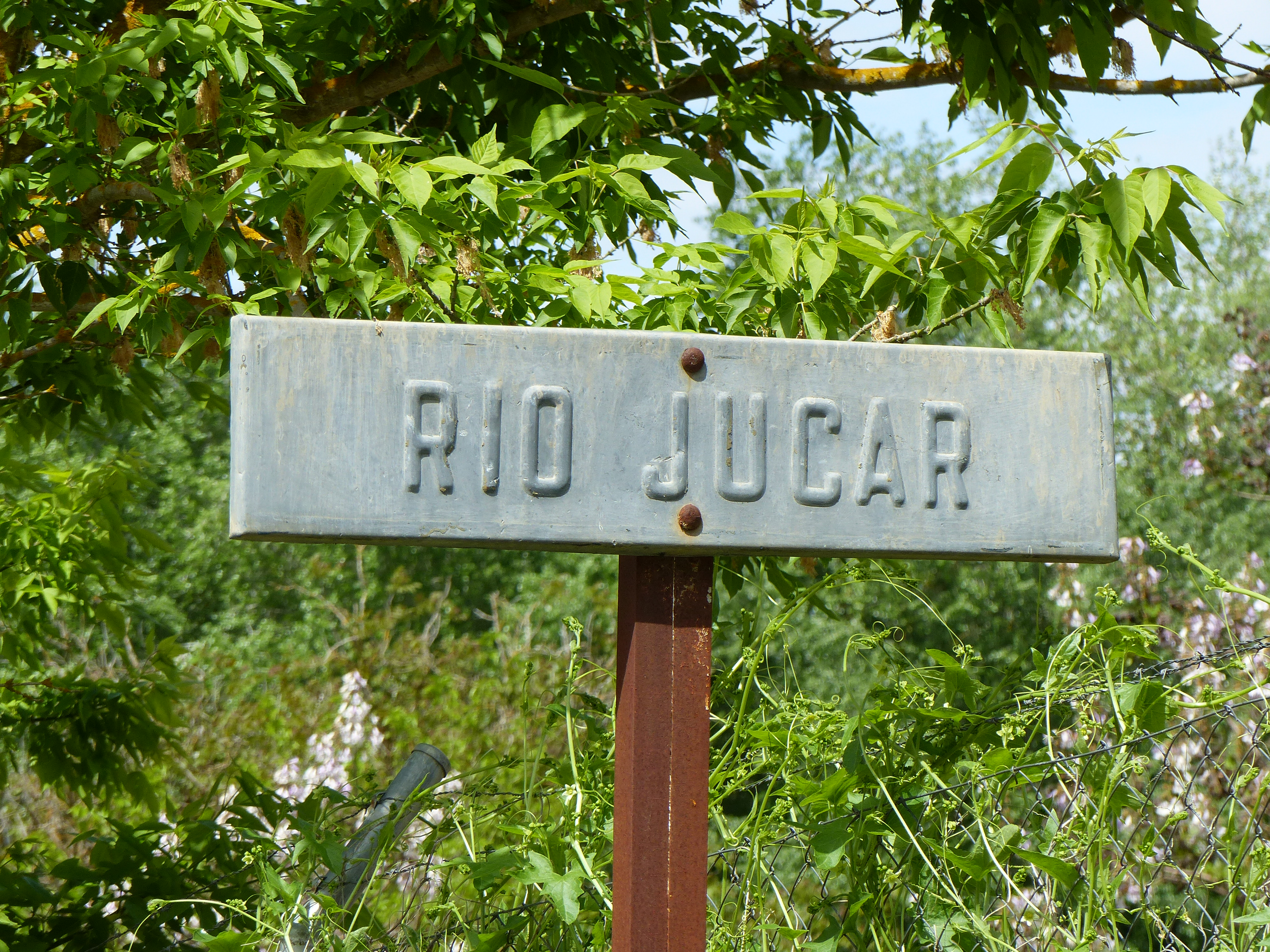 Señal indicativa al lado del río Júcar